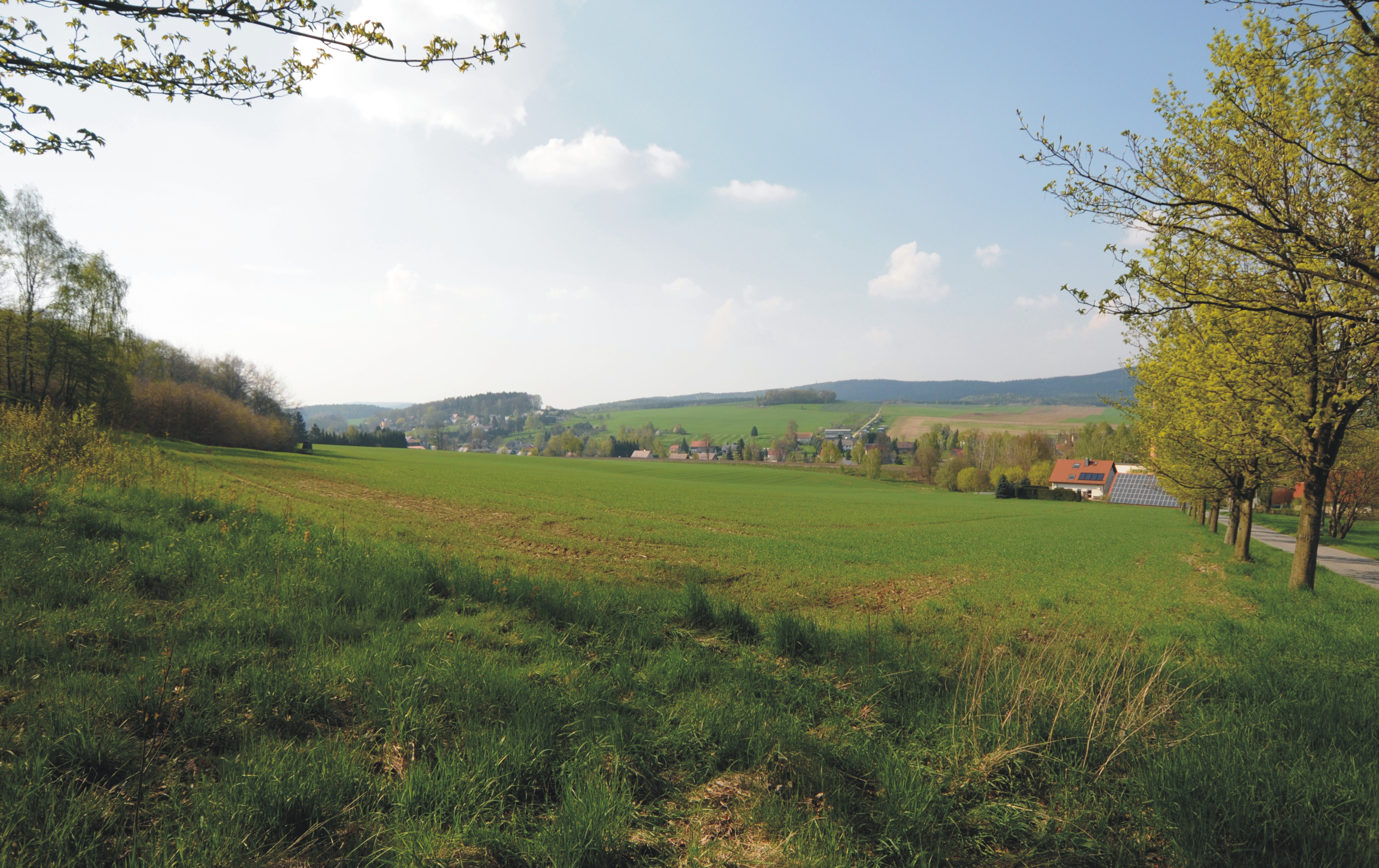 Blick auf Taubenheim (Sohland / Spree, Sachsen, Deutschland)